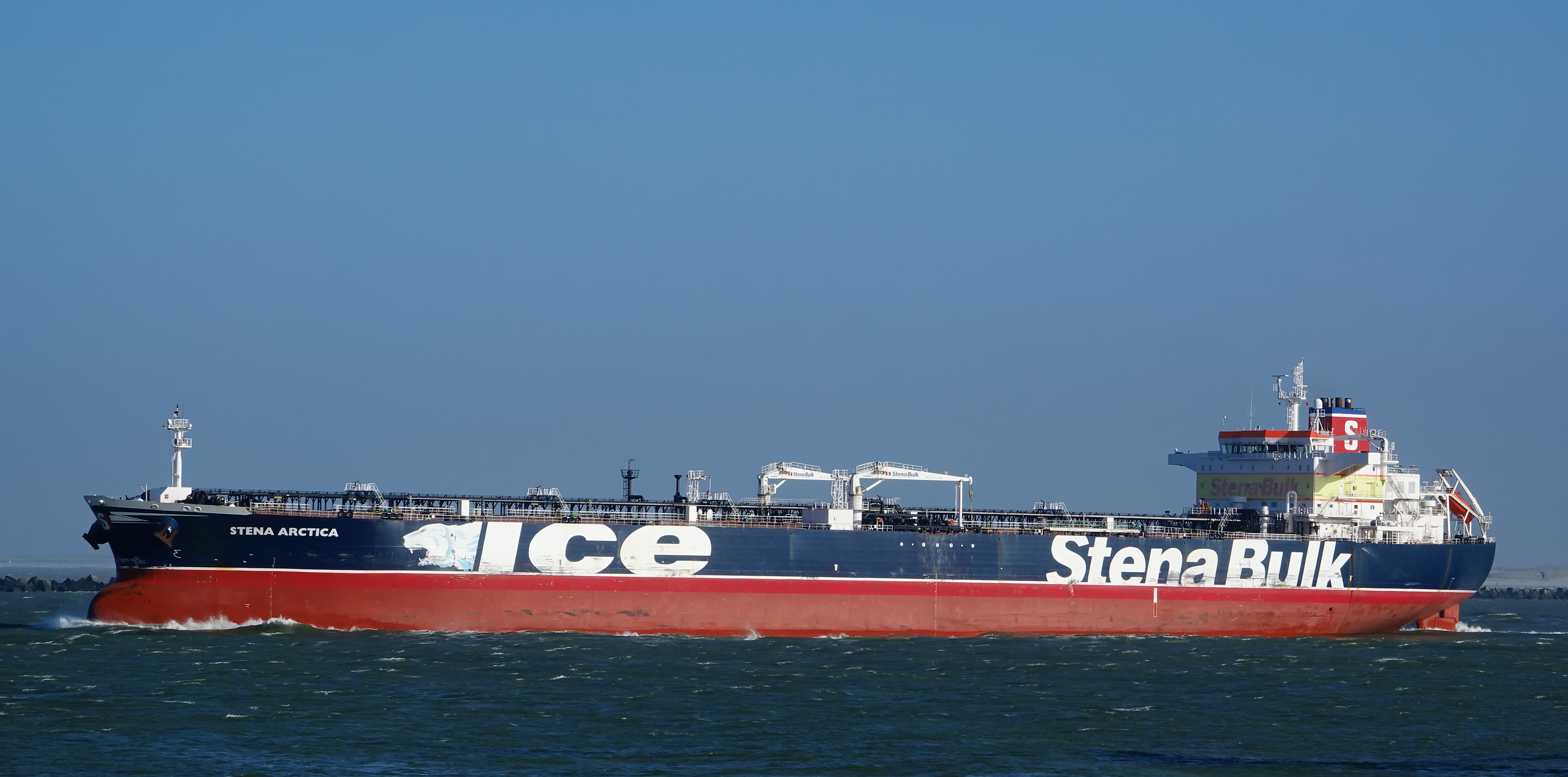 Maasmond 9-2-2019